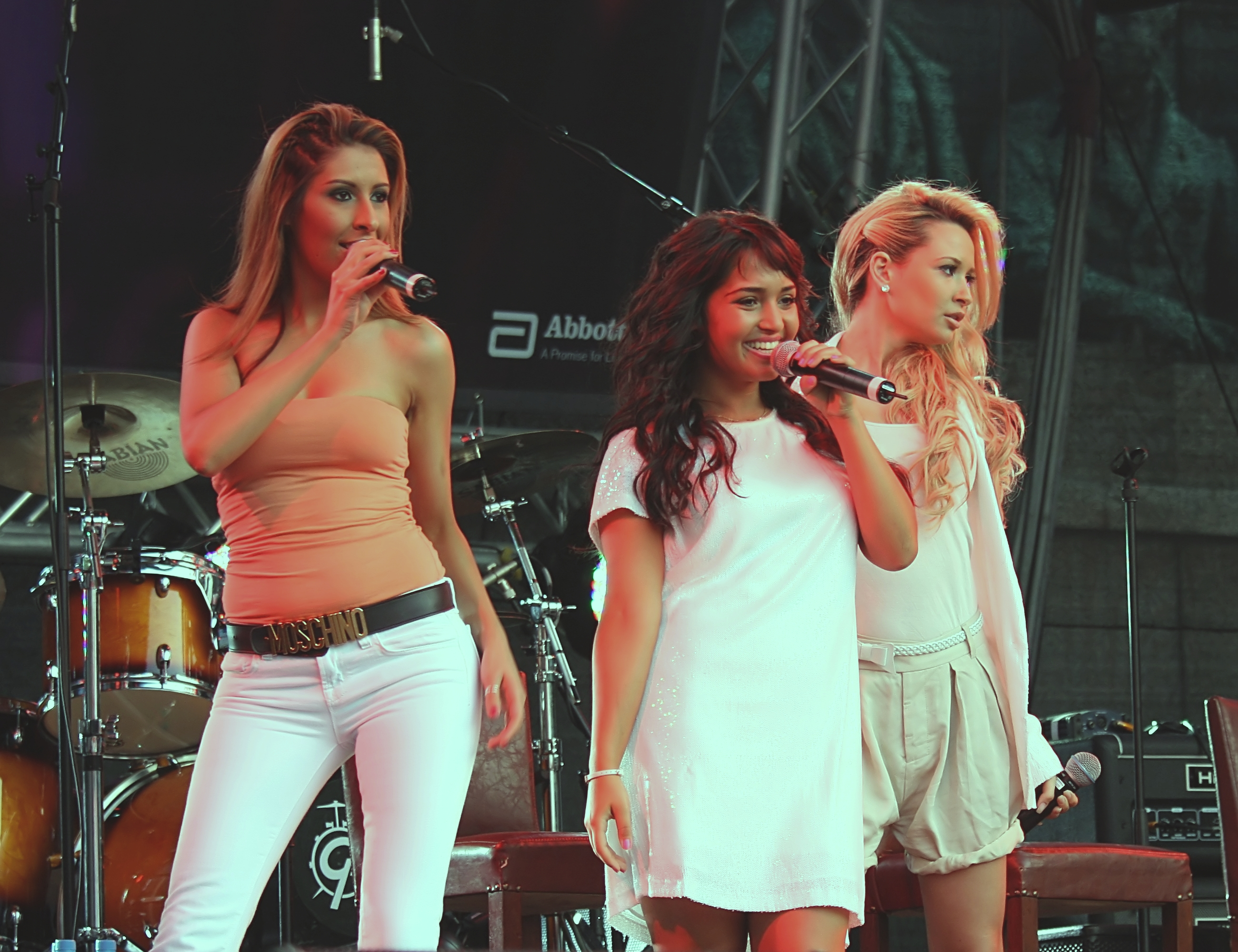 Die Gruppe „Monrose“ - Senna Guemmour, Mandy Capristo, Bahar Kızıl - auf der Hauptbühne auf dem Heumarkt, Köln. Bühnenprogramm zum CSD-Straßenfest/ColognePride 2009.